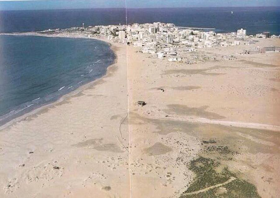 بين الصورة صور أحد مدن لبنان عام 1950